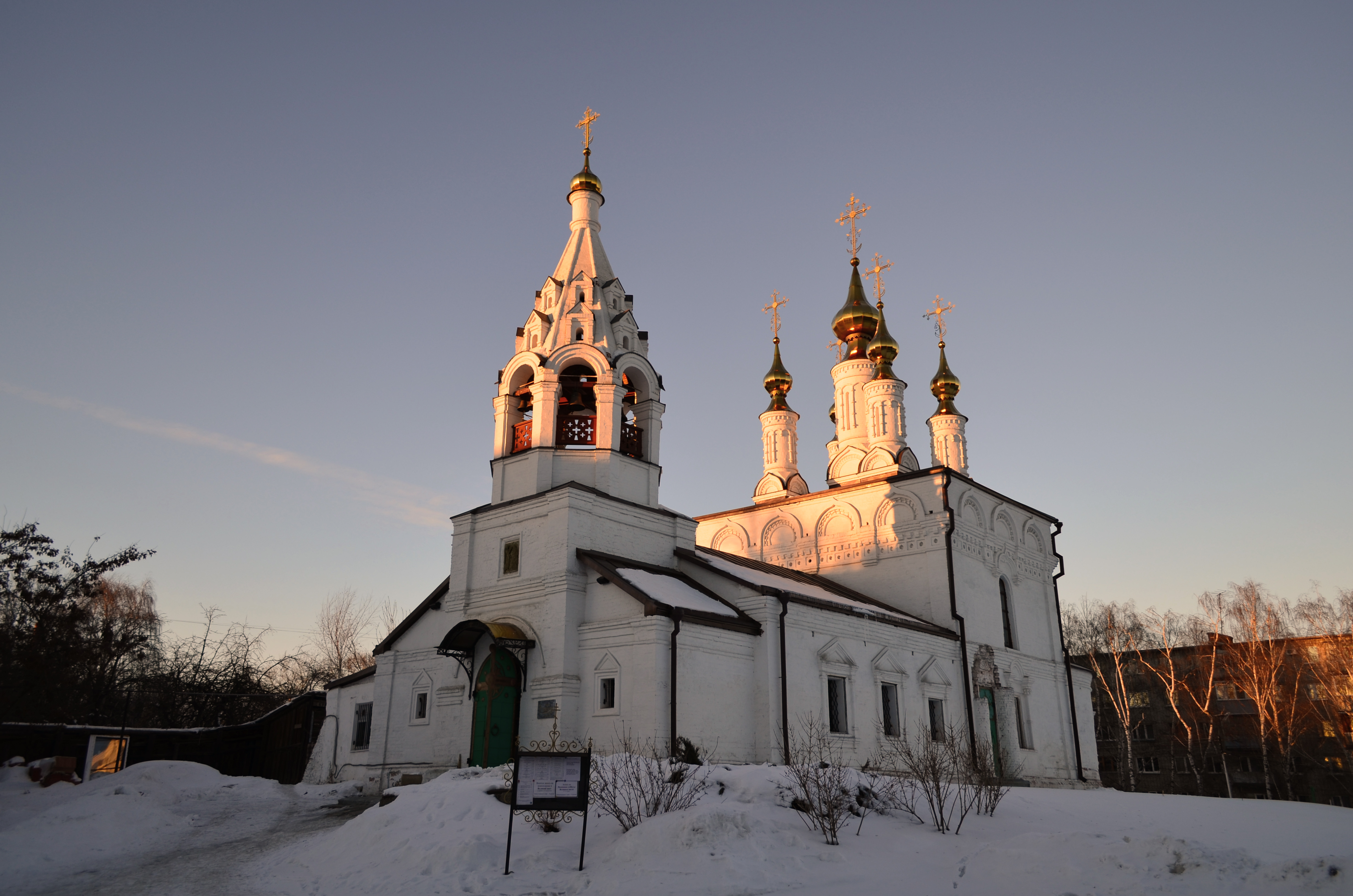 Рязань.Храм Благовещения Пресвятой Богородицы.1673.